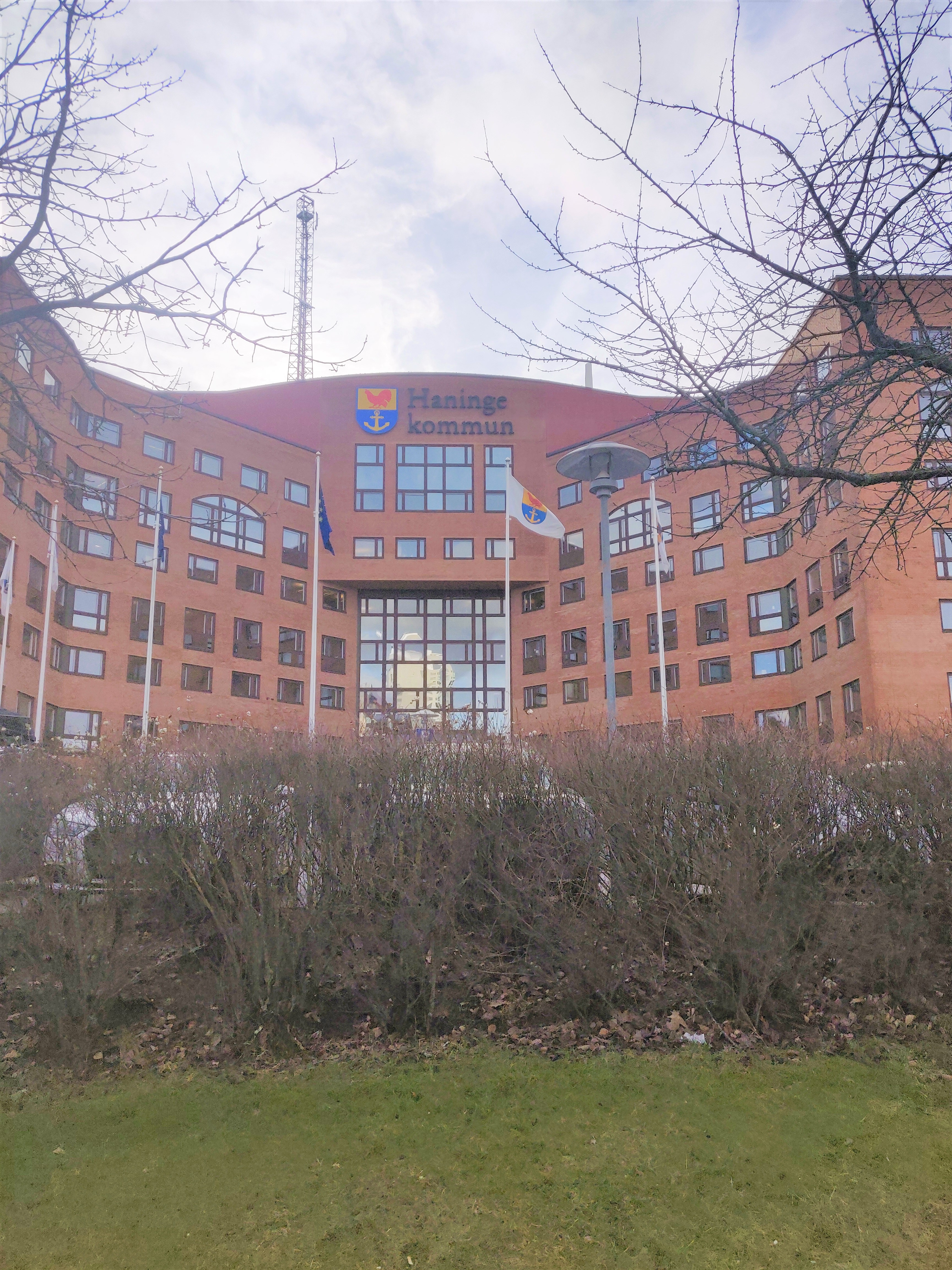 Kommunhuset i Haninge kommun, Stockholms län.